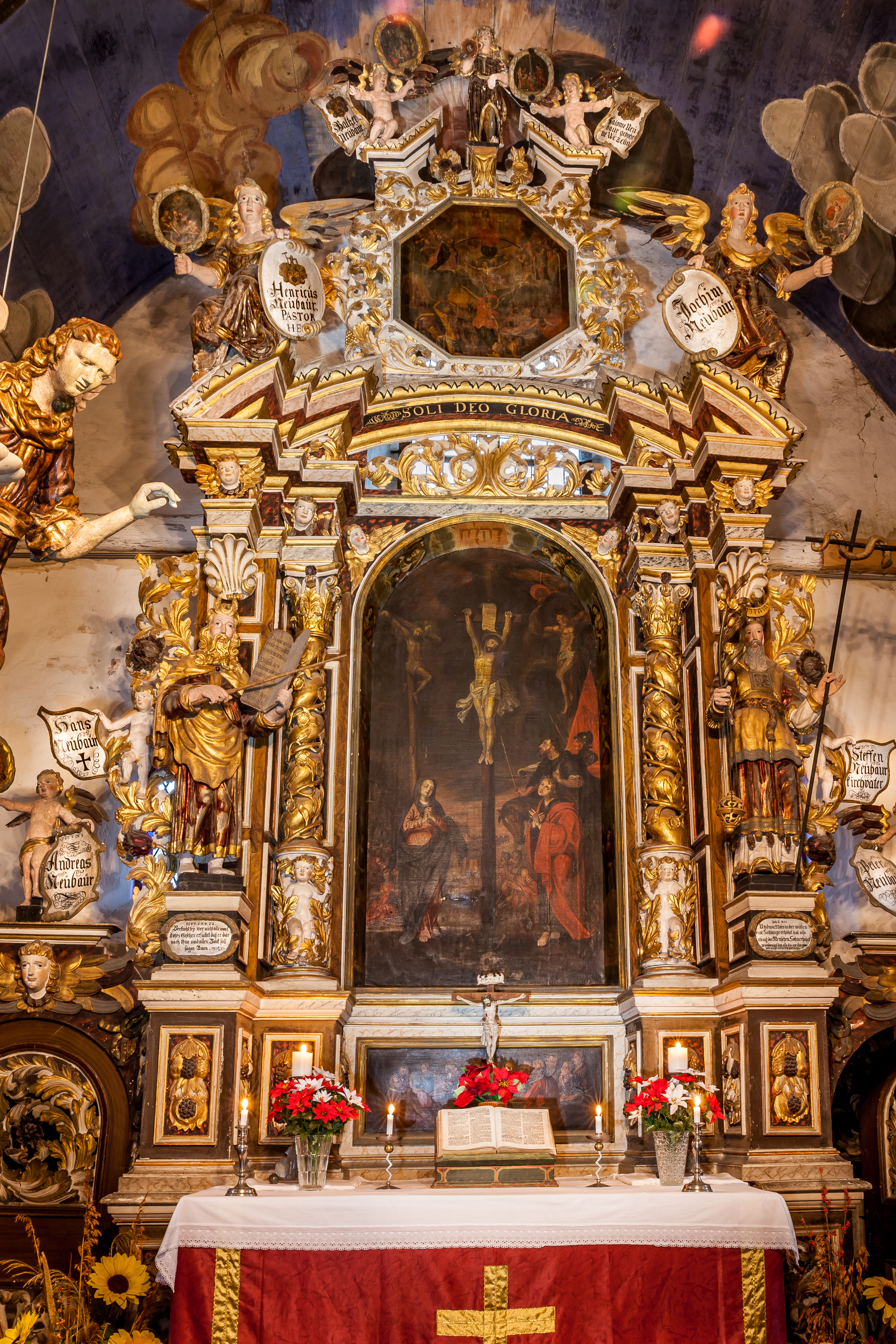 St. Valentin (14. Jh.), Deesdorf, Sachsen-Anhalt, Altar (1693), Dezember 2015